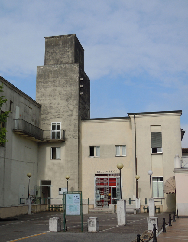 Castel Goffredo-Torre Littoria.jpg